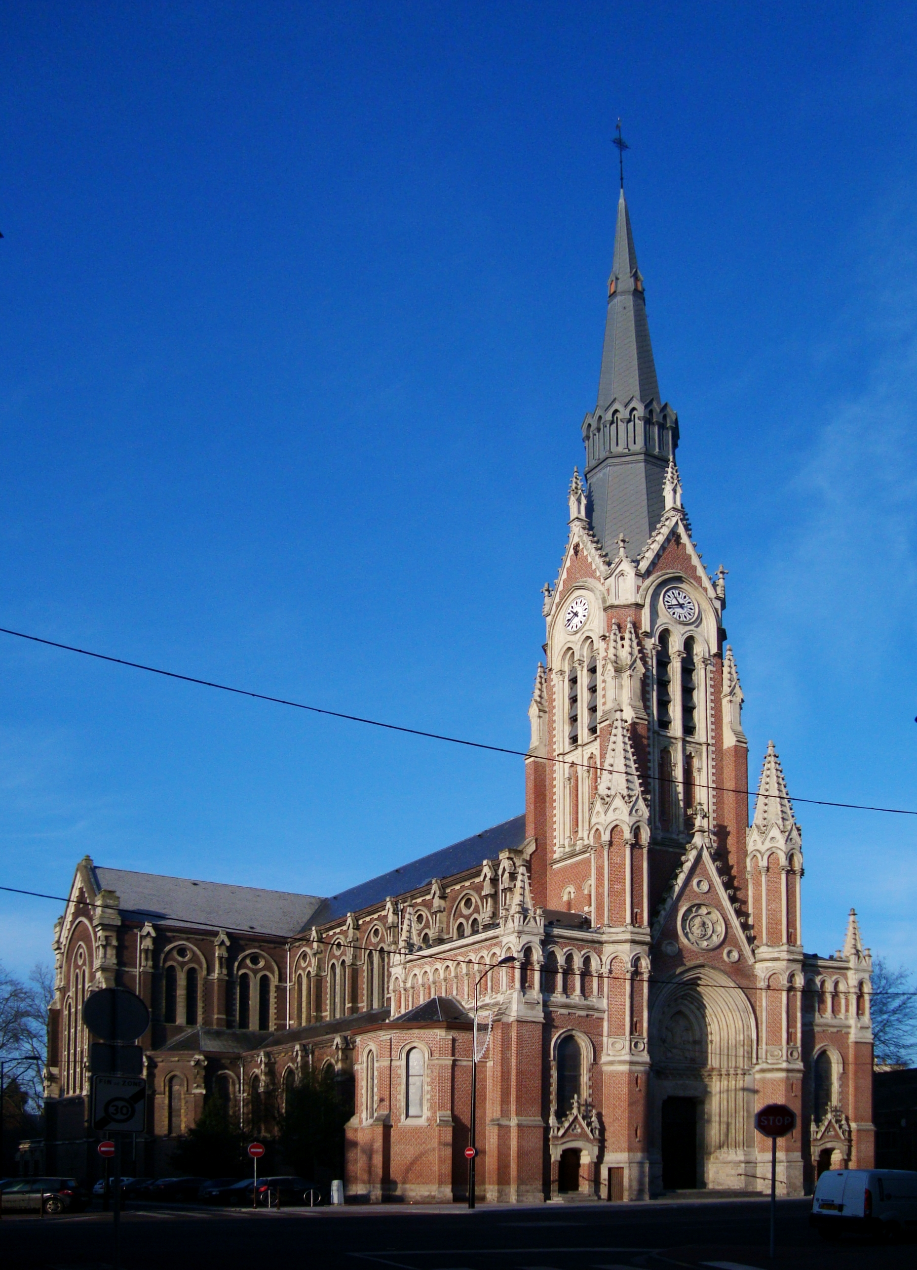 L'église du Sacré-Cœur de Tourcoing (Nord). Construite en 1877 par l'architecte Louis Croïn.